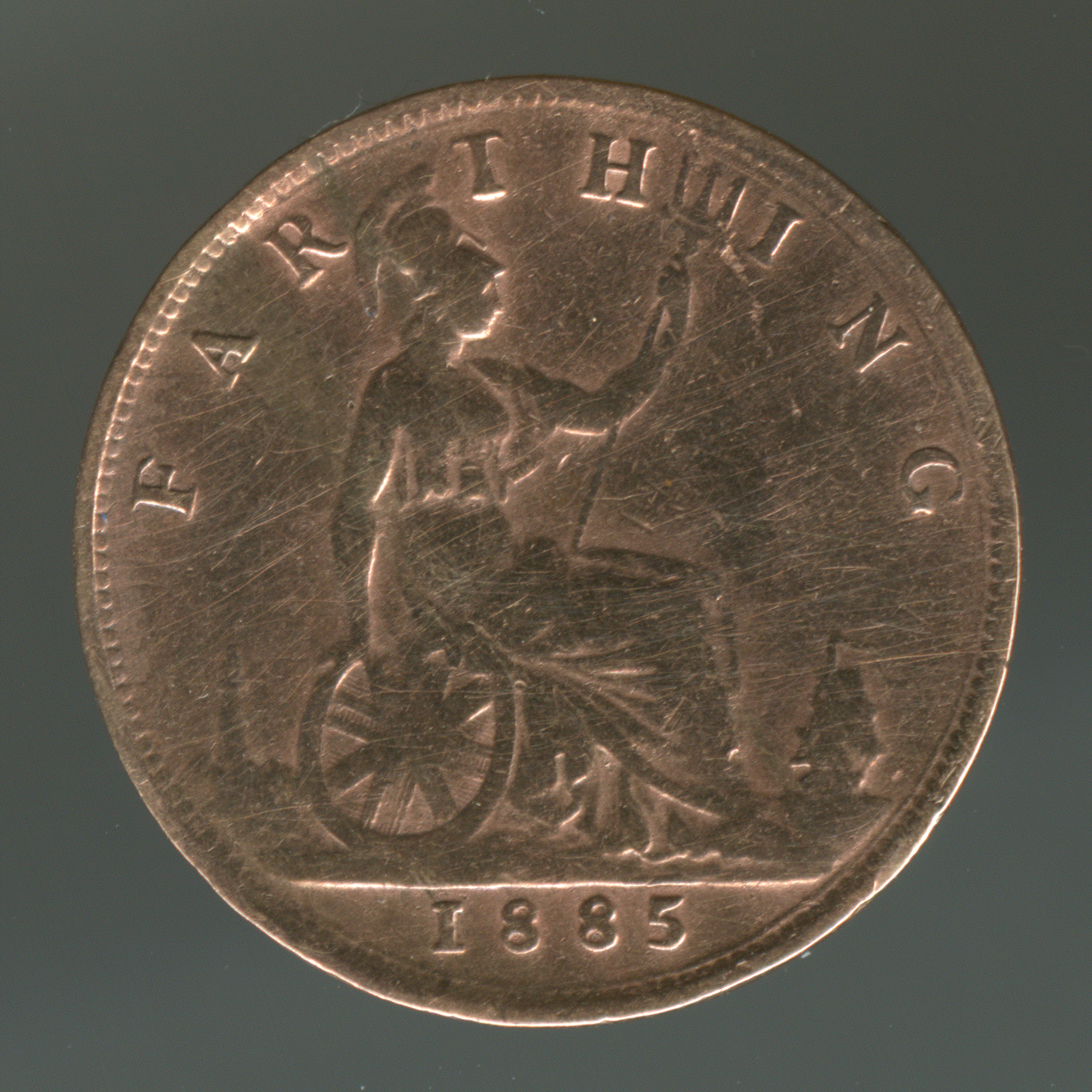 Britische Farthing-Münze 1885 während der Regentschaft von Queen Victoria, hergestellt aus Kupfer.